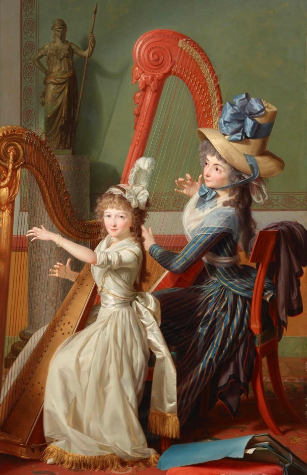 Jean-Antoine-Théodore Giroust (1753–1817): La leçon de harpe, 1791 (Ausschnitt). Die Schriftstellerin Félicité de Genlis (1746–1830) erteilt Adélaïde d’Orléans (1777–1847), der Schwester des späteren Königs Louis-Philippe, Harfenunterricht. Dallas Museum of Art.